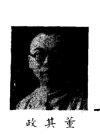 中文（中国大陆）: 制憲國民大會代表